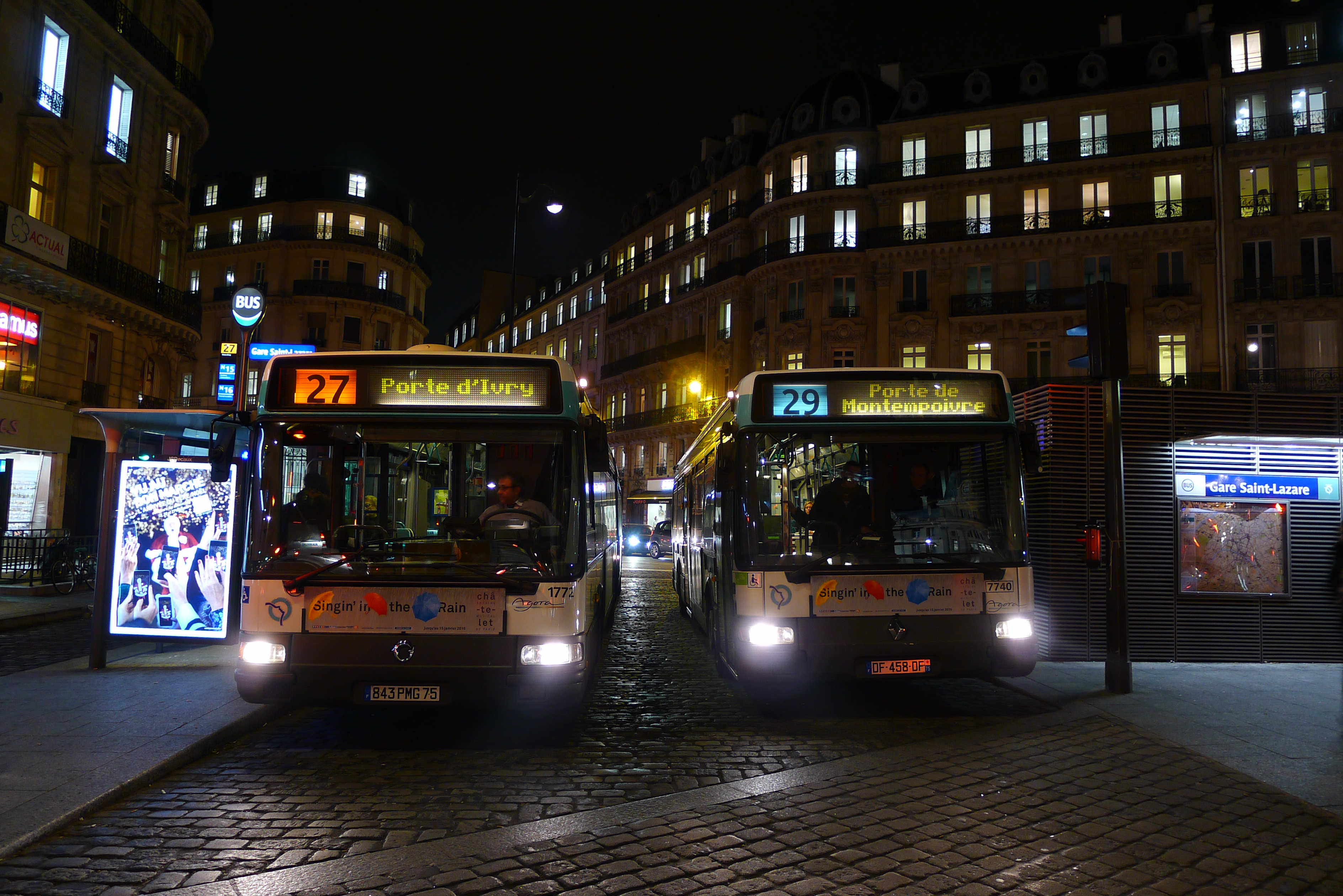 Autobus Renault Agora L €3 n°1772 de la Ratp sur la ligne 27 et autobus Renault Agora S €2 n°7740 de la Ratp sur la ligne 29 à la Gare Saint-Lazare